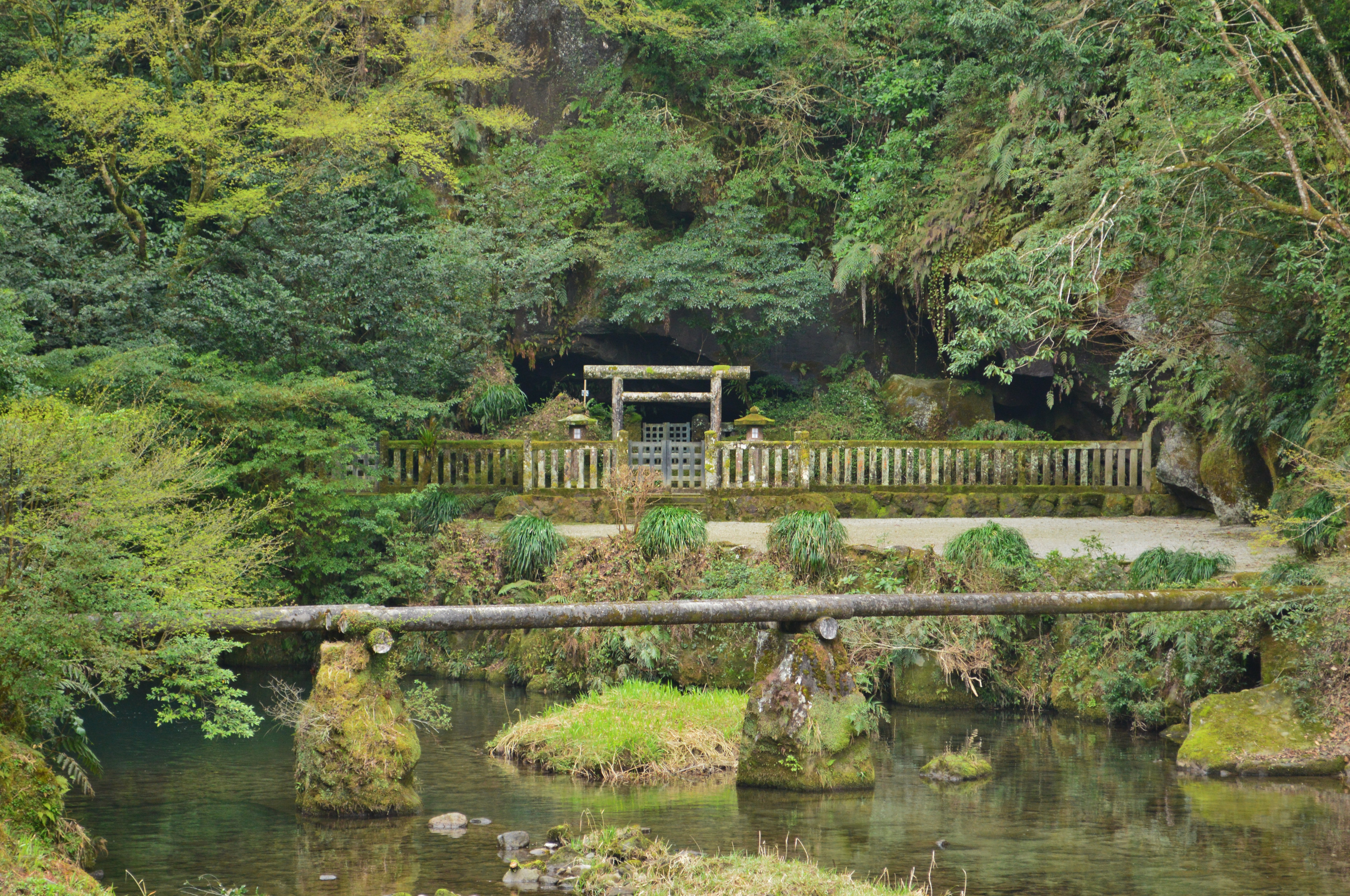 天津日高彦波瀲武鸕鷀草葺不合尊吾平山上陵 拝所